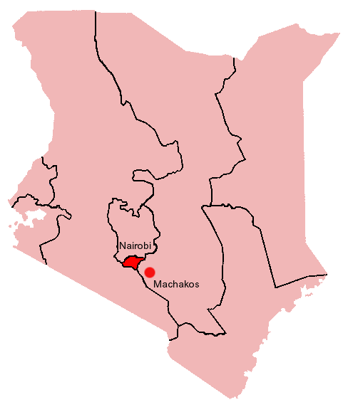 Lage des Ortes Machakos in Kenia